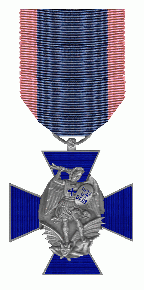 Orde van Verdienstevan Beieren